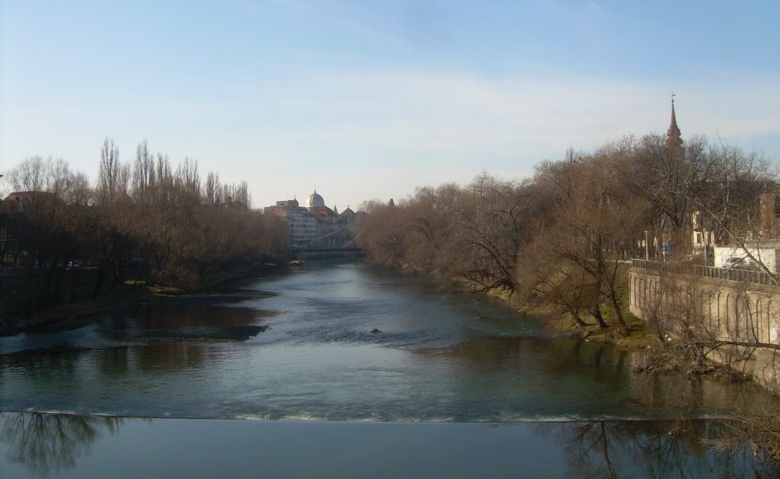 Crişul Repede văzut de pe Podul Dacia din Oradea